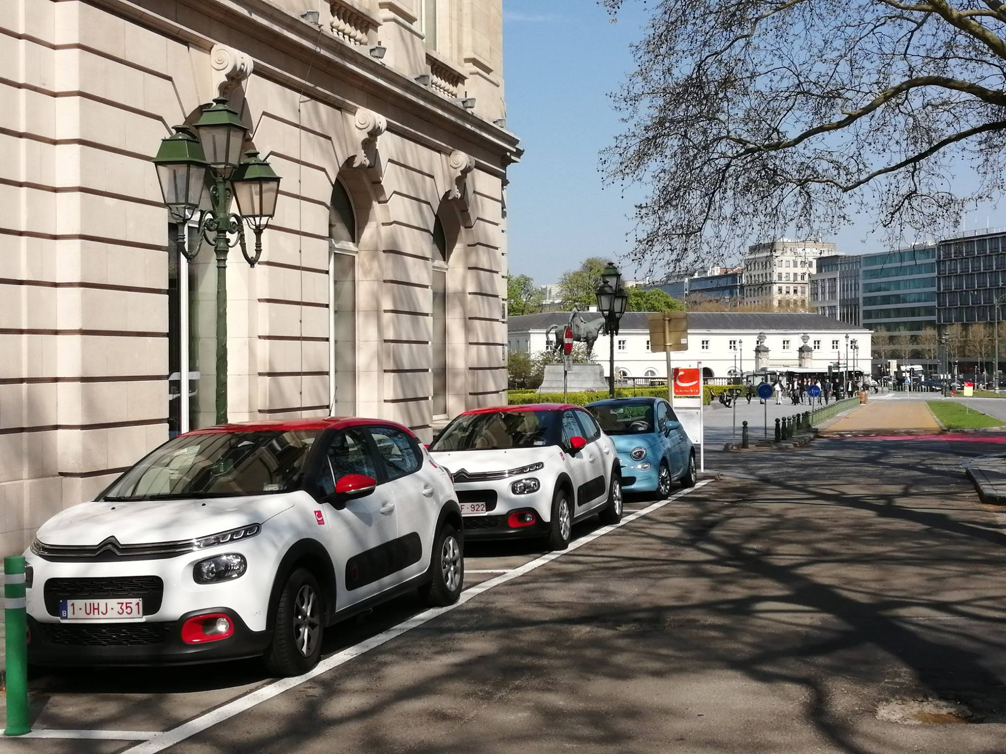 Eine cambio-Station im Stadtbild Brüssels.